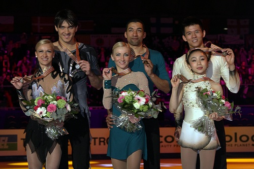 Подиум чемпионата мира по фигурному катанию 2012 в парном катании. Татьяна Волосожар / Максим Траньков (2-е место), Алёна Савченко / Робин Шолковы (1-е место), Наруми Такахаси / Мервин Тран (3-е место)